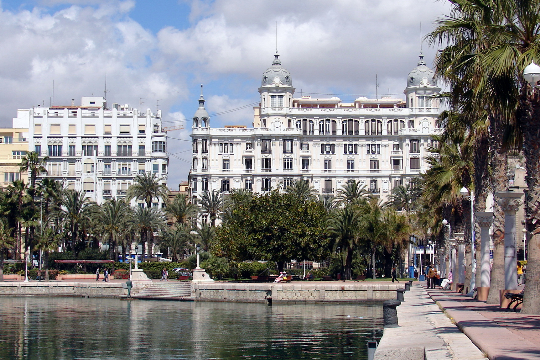 Als „Casa Carbonell“ bekannt, ist dieses Gebäude mit der Hausnummer 1 an der Explanada de España in Alicante.